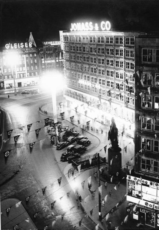 Berlin; Alexanderplatz (Olympiade 1936) Nachtaufnahme